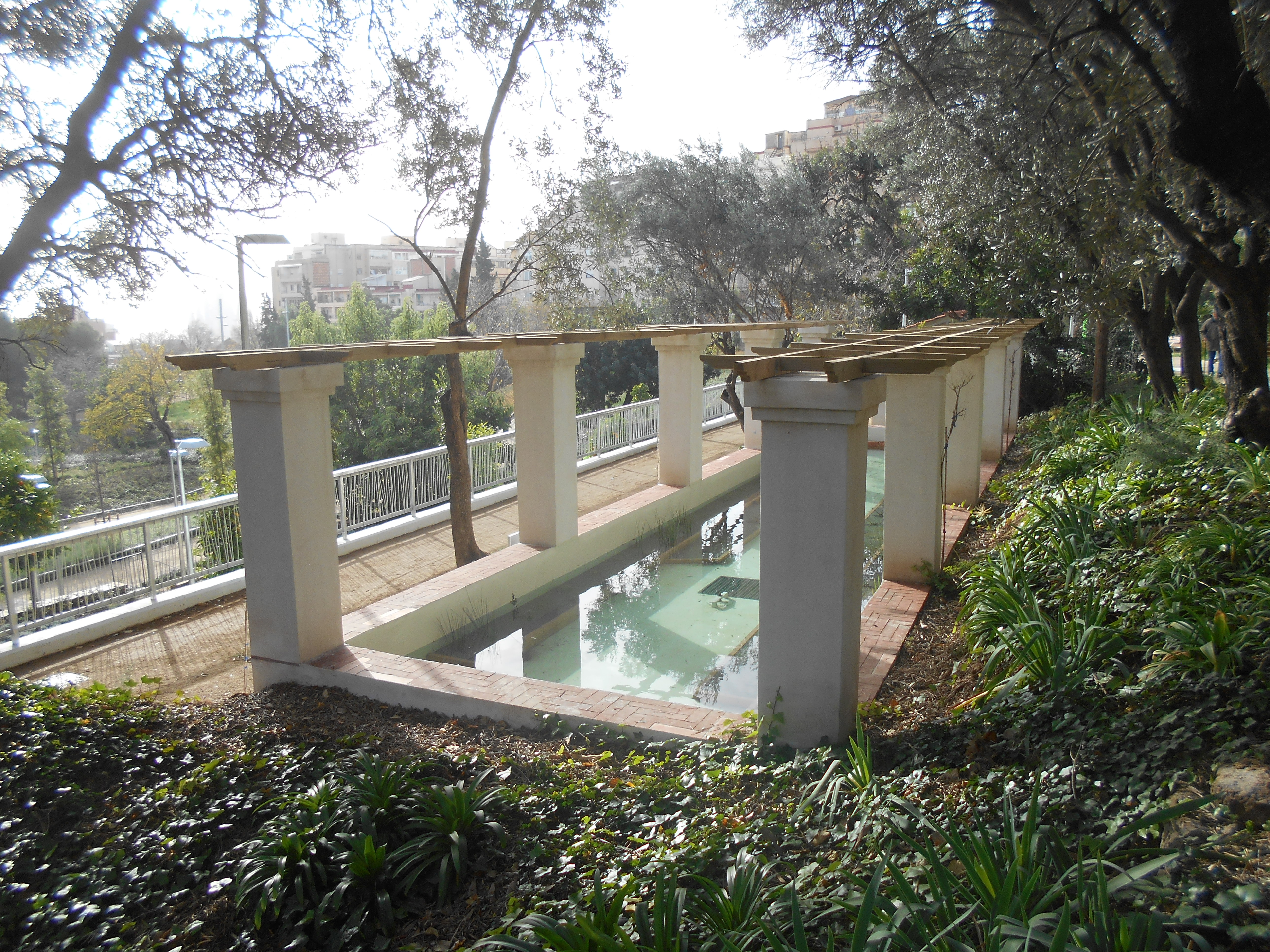 Jardines del Doctor Pla i Armengol